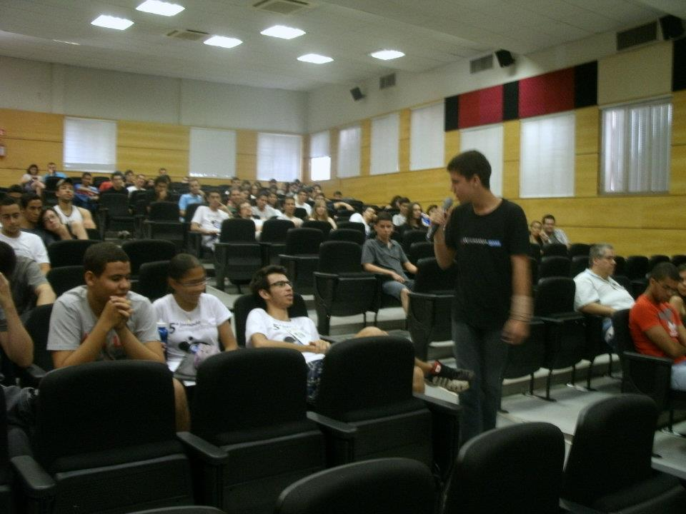 Jonas interage com estudantes perguntando "o que fariam com uma Wiki"